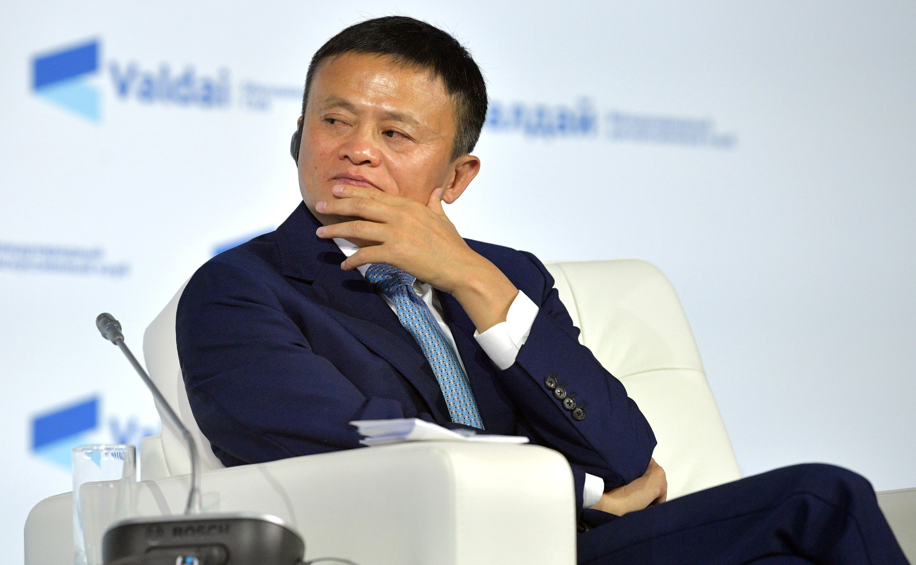 Председатель совета директоров компании «Алибаба Груп» Джек Ма на заседании Международного дискуссионного клуба «Валдай»